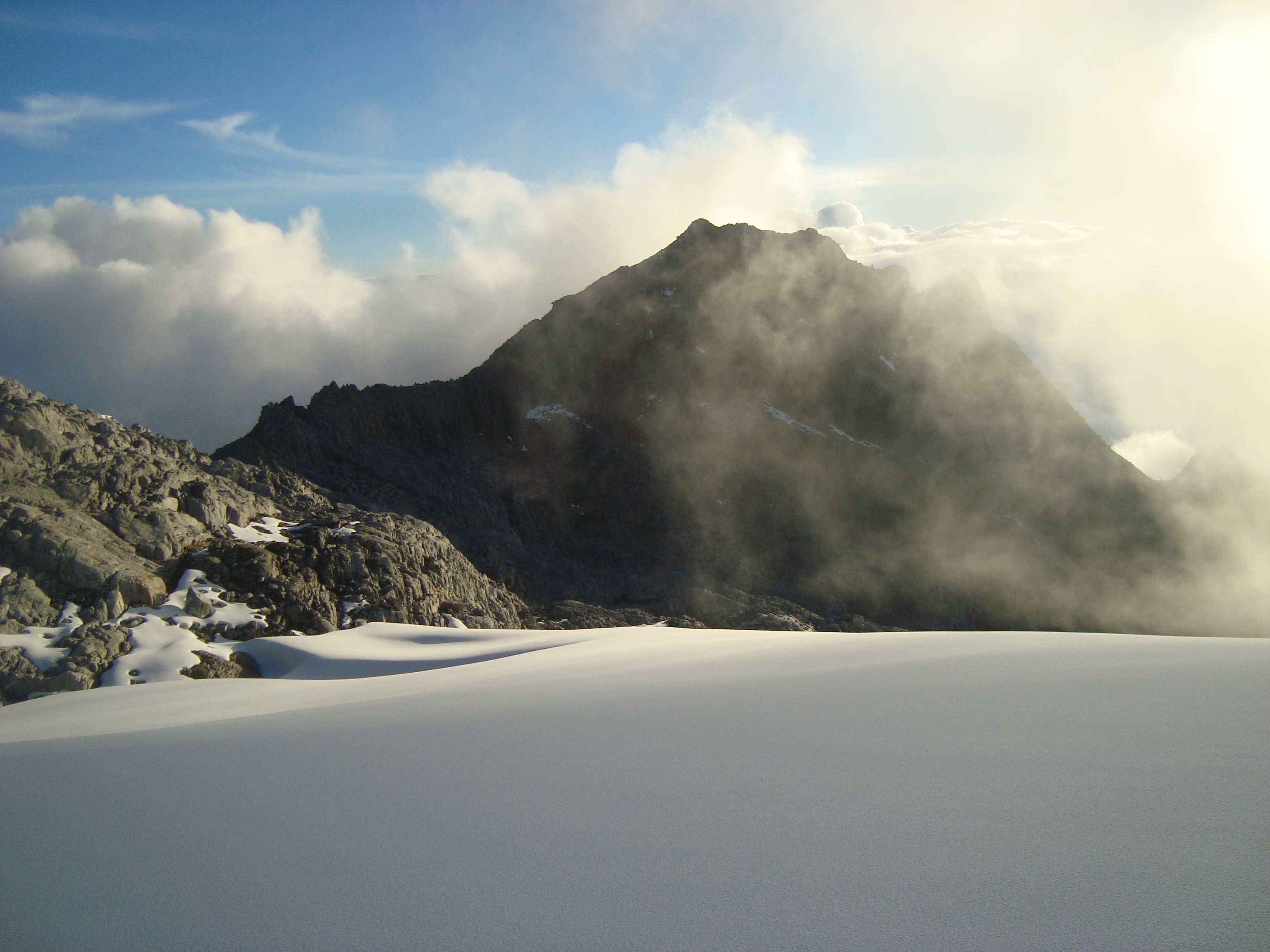 Pico Bonpland visto desde el Pico Humboldt, Parque Nacional Sierra Nevada, Estado Mérida, Venezuela.